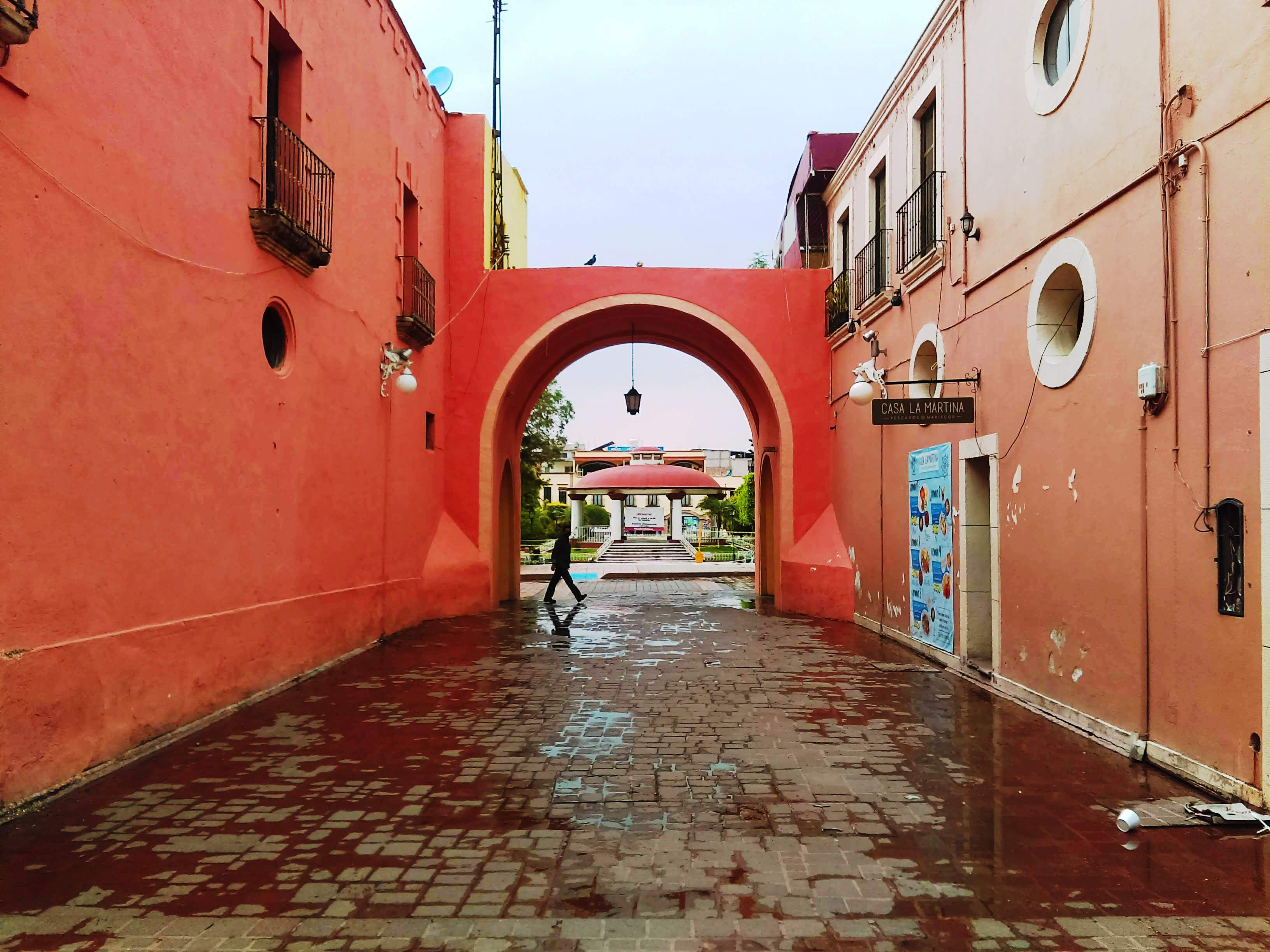 Templo y exconvento de San Nicolás de Tolentino en Actopan, Hidalgo, México.